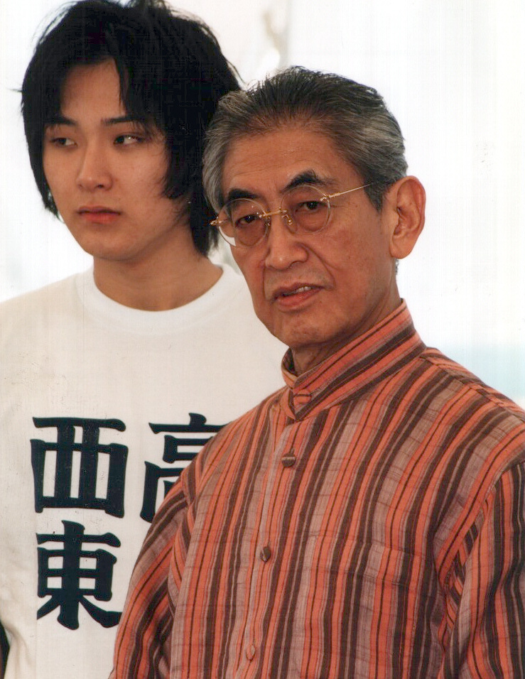 Nagisa Ōshima and Ryūhei Matsuda at Cannes in 2000